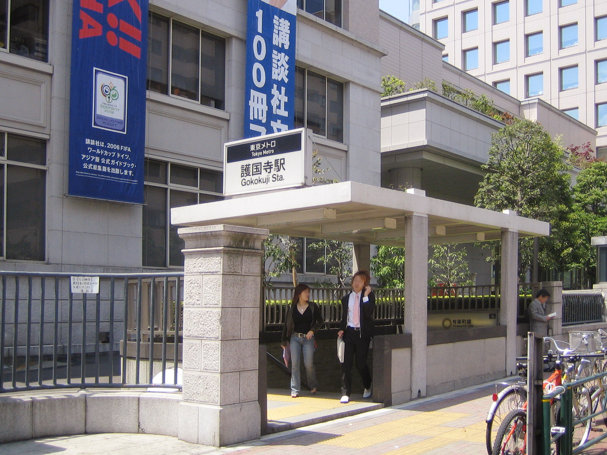 Gokokuji Sta. (護国寺駅), in Bunkyo, Tokyo, Japan